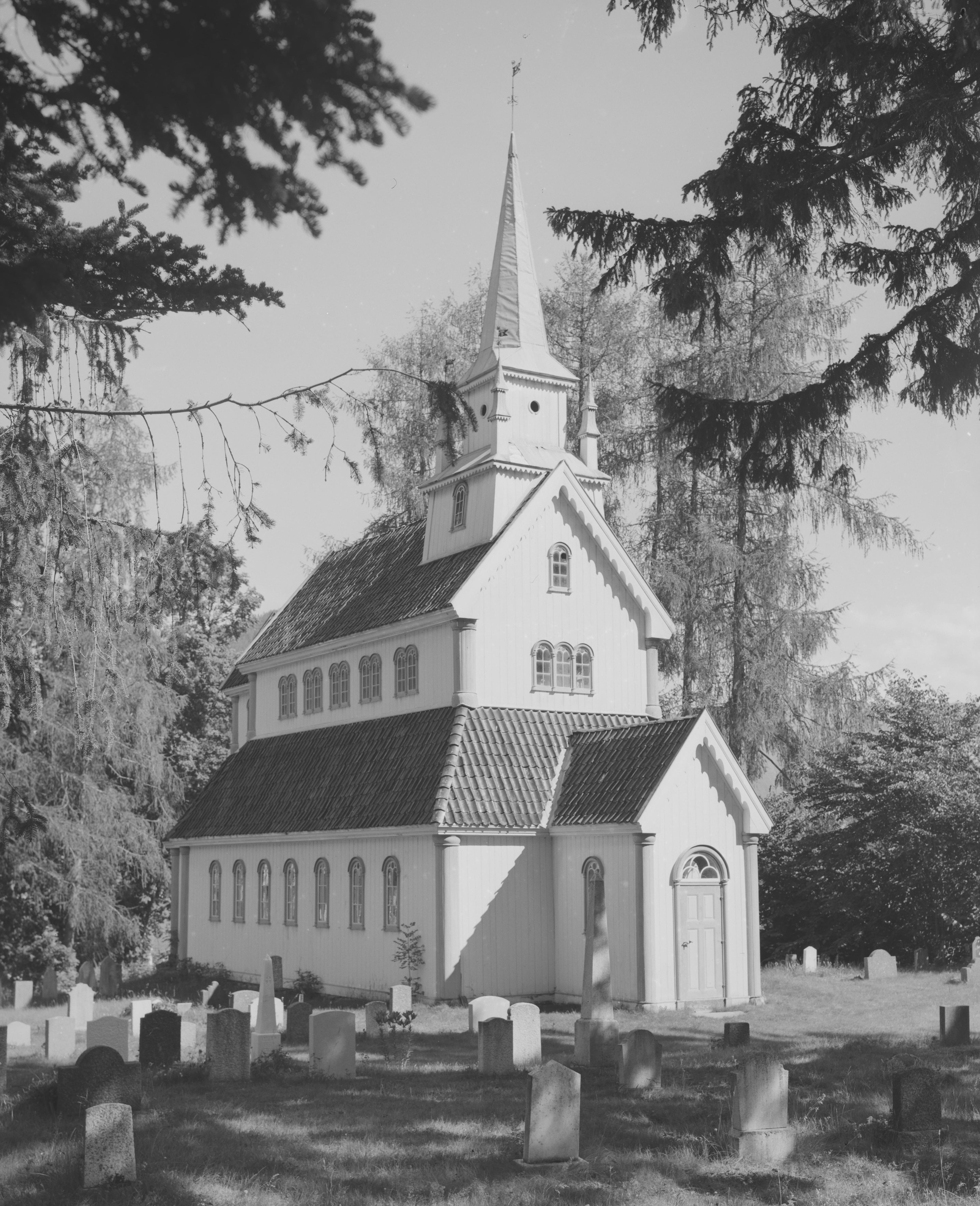 Bildet er hentet fra Nasjonalbibliotekets bildesamling. Anmerkninger til bildet var: Fotograf: ÅM Kaupanger, Sogndal, Sogn og Fjordane